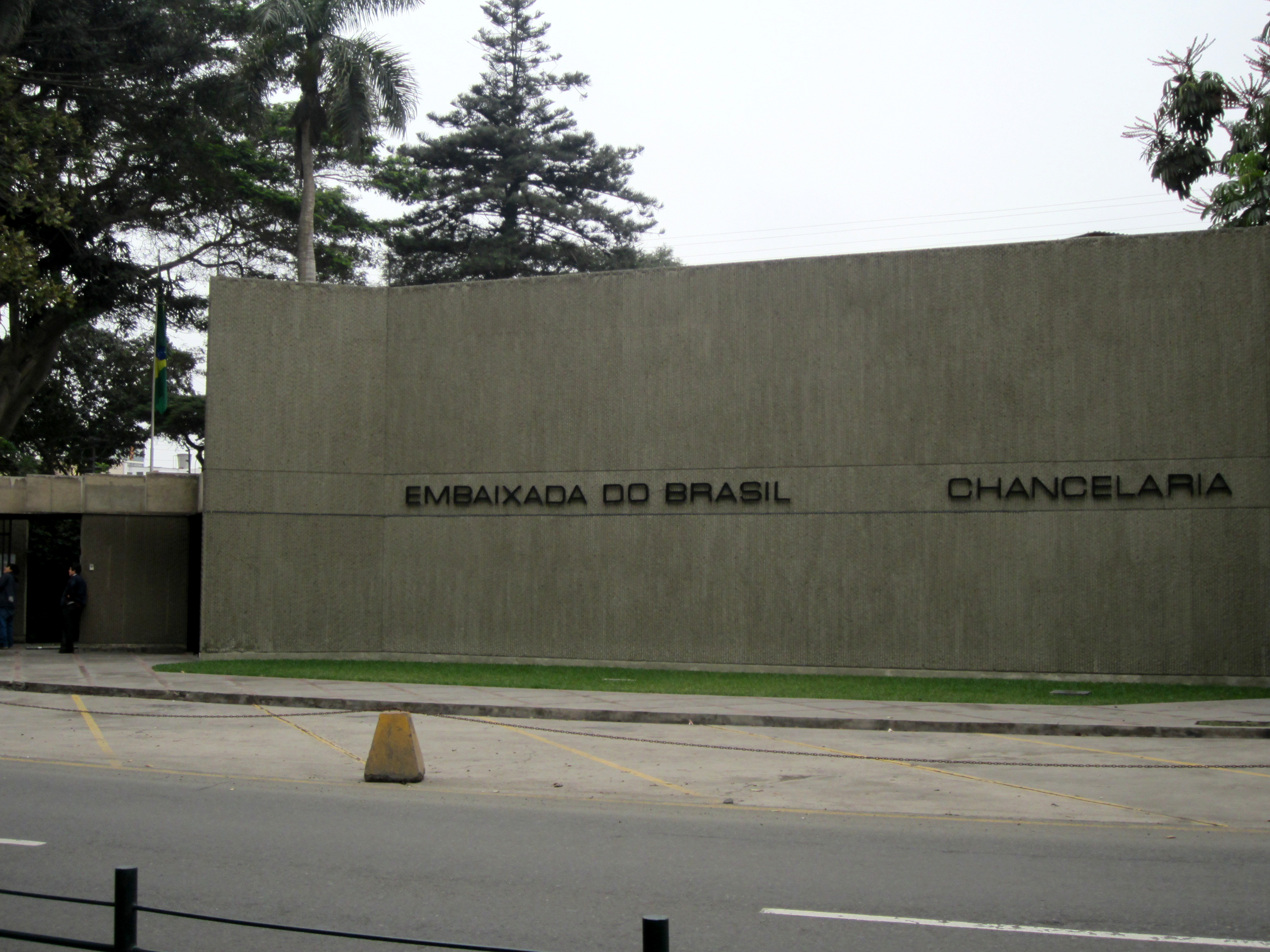 Ambassade du Brésil au Pérou, Miraflores, Lima